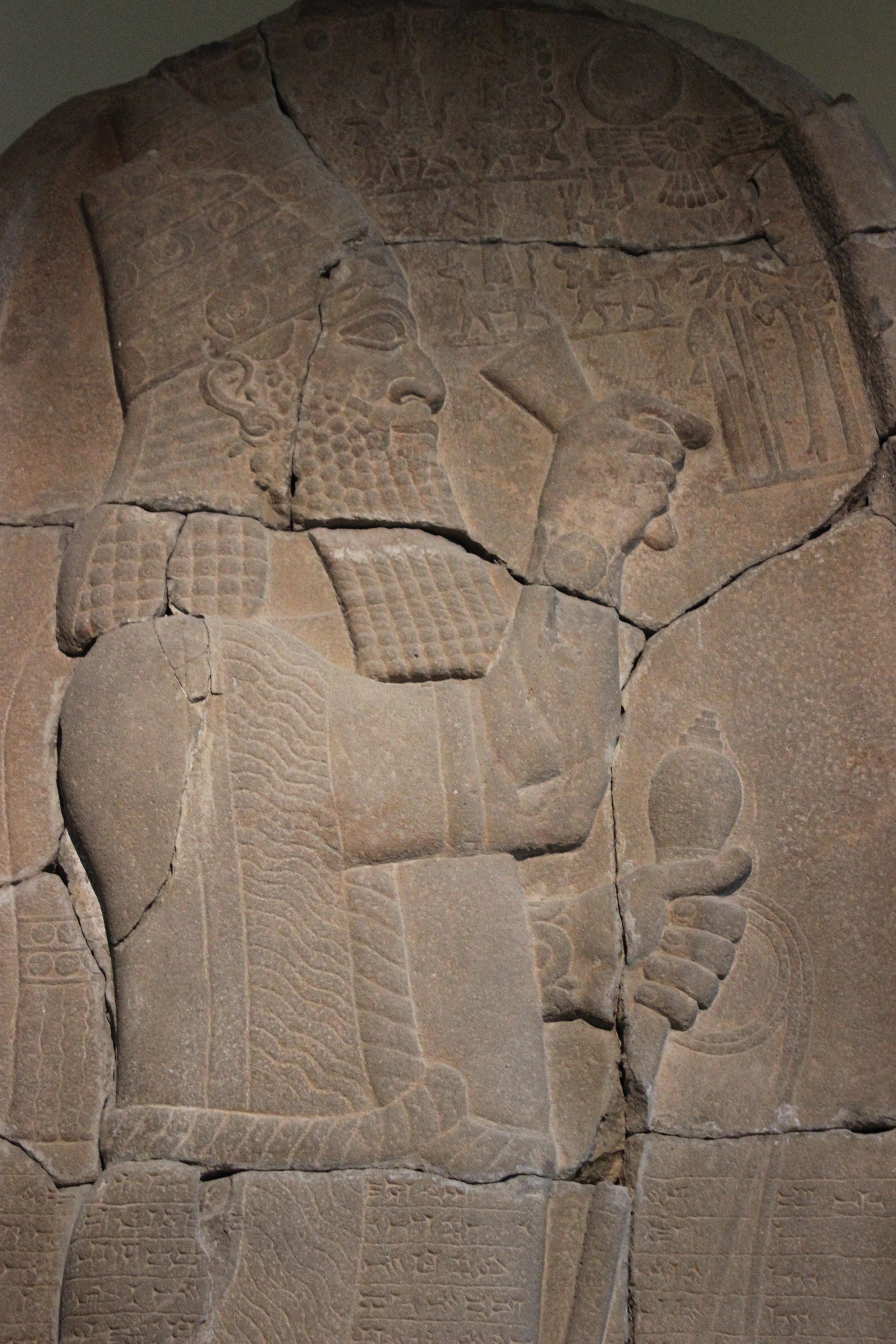 Berlín. Pergamon Museum, estela de Asarhadon. 671 a.C.